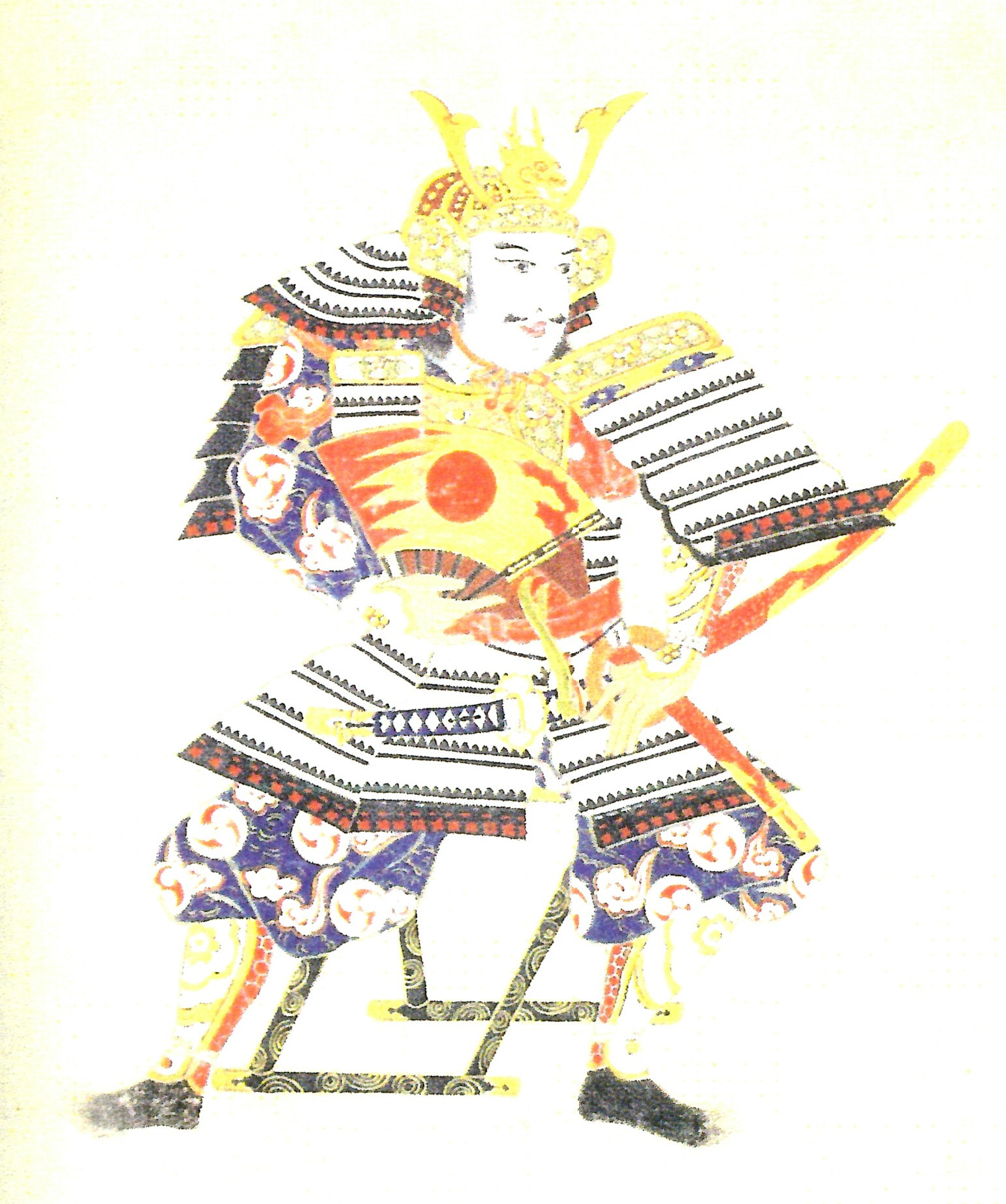 南部安信の肖像。